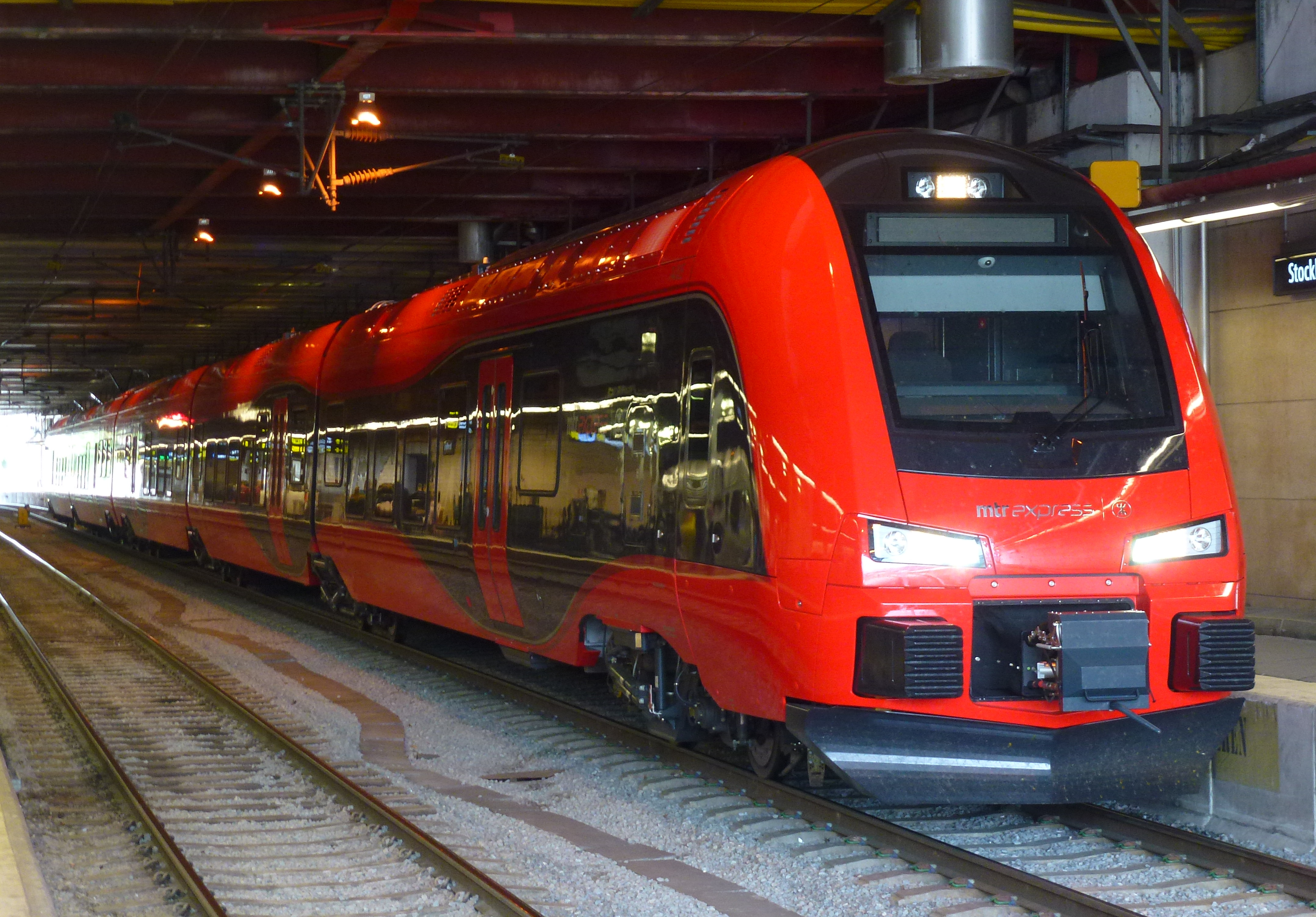 MTR Express på Stockholm Central